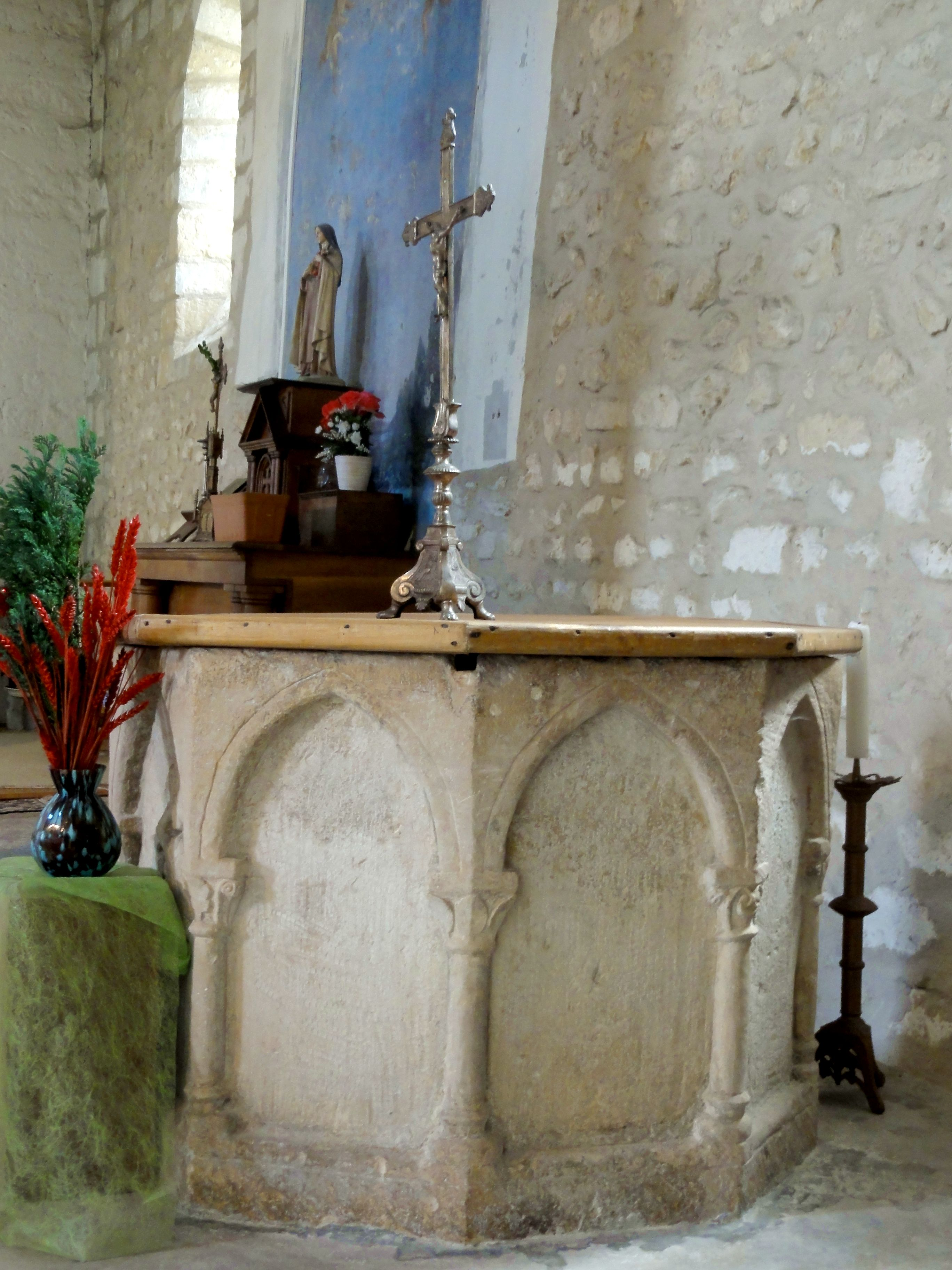 Bas-côté sud, fonts baptismaux, début XIIIe s.